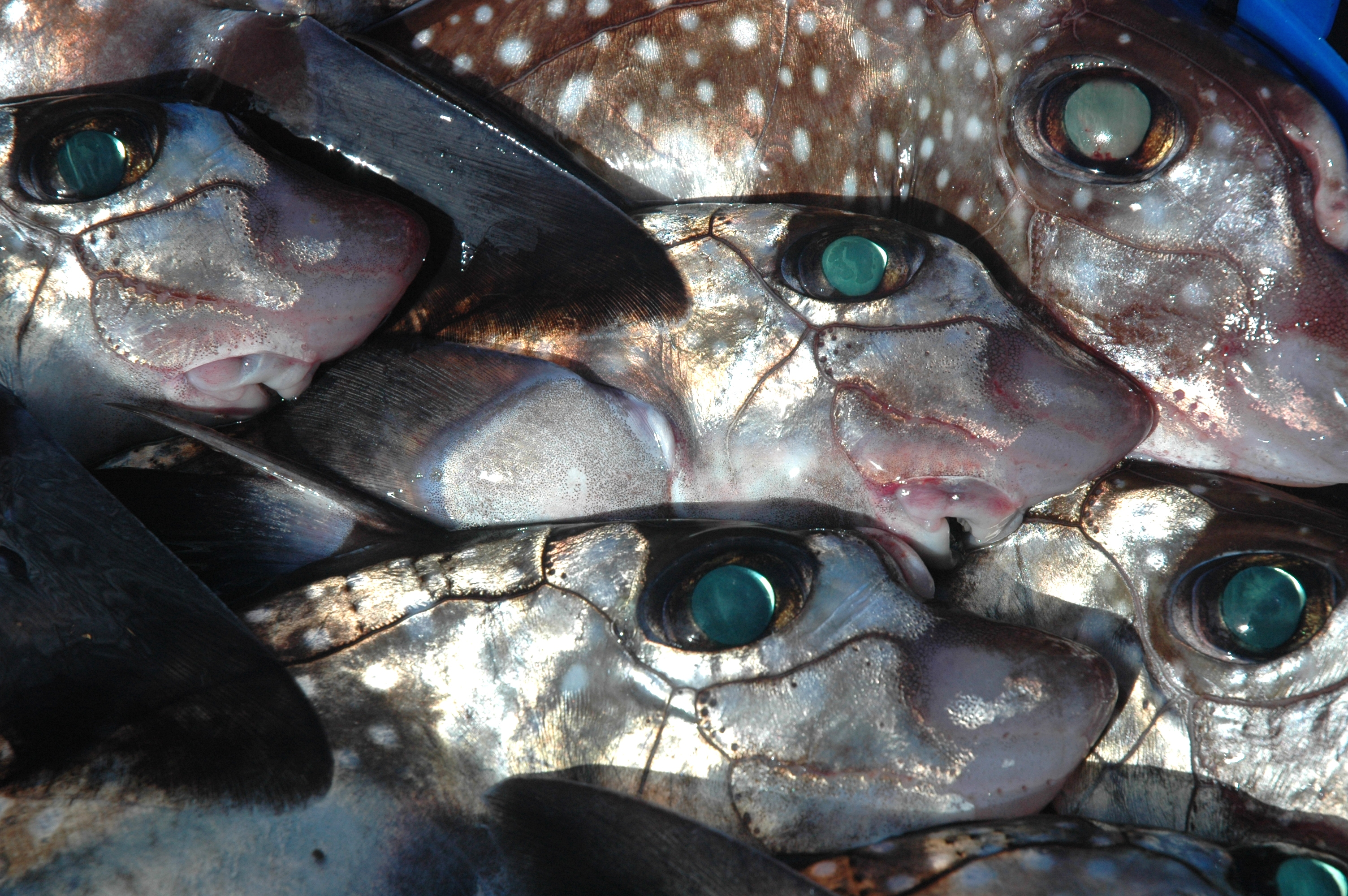 Chimaera monstrosa